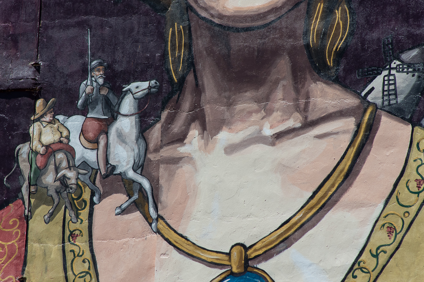 Lúcida locura - 20 Quintanar de la Orden.